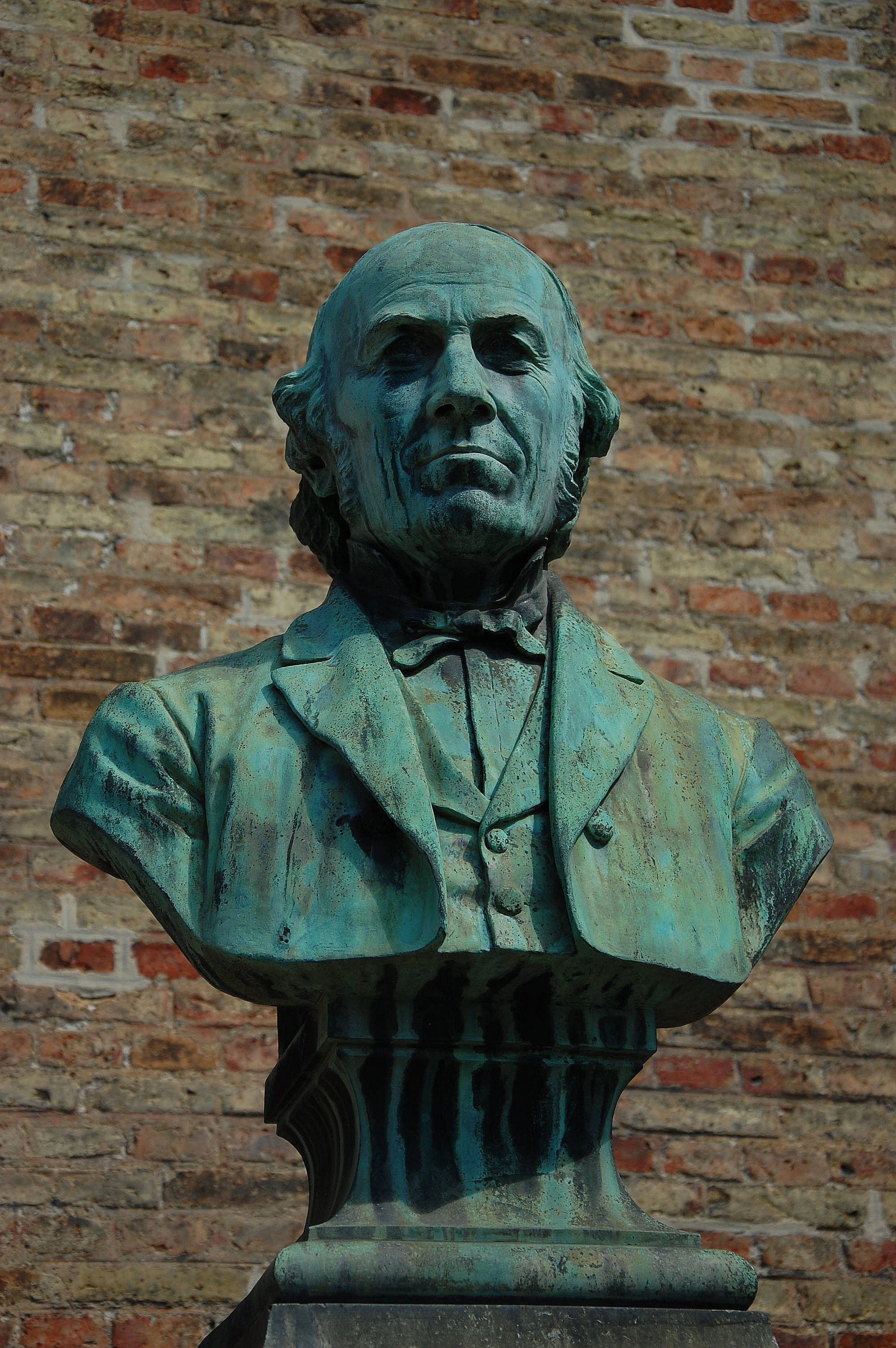 Minnesmerke over Ludvig Mathias Lindeman til høyre for hovedinngangen i Oslo domkirke. Bysten er utført av Carl Ludvig Jacobsen (1835-1923) og ble avduket i 1906. Lindeman virket som organist i domkirken fra 1833 til 1887.